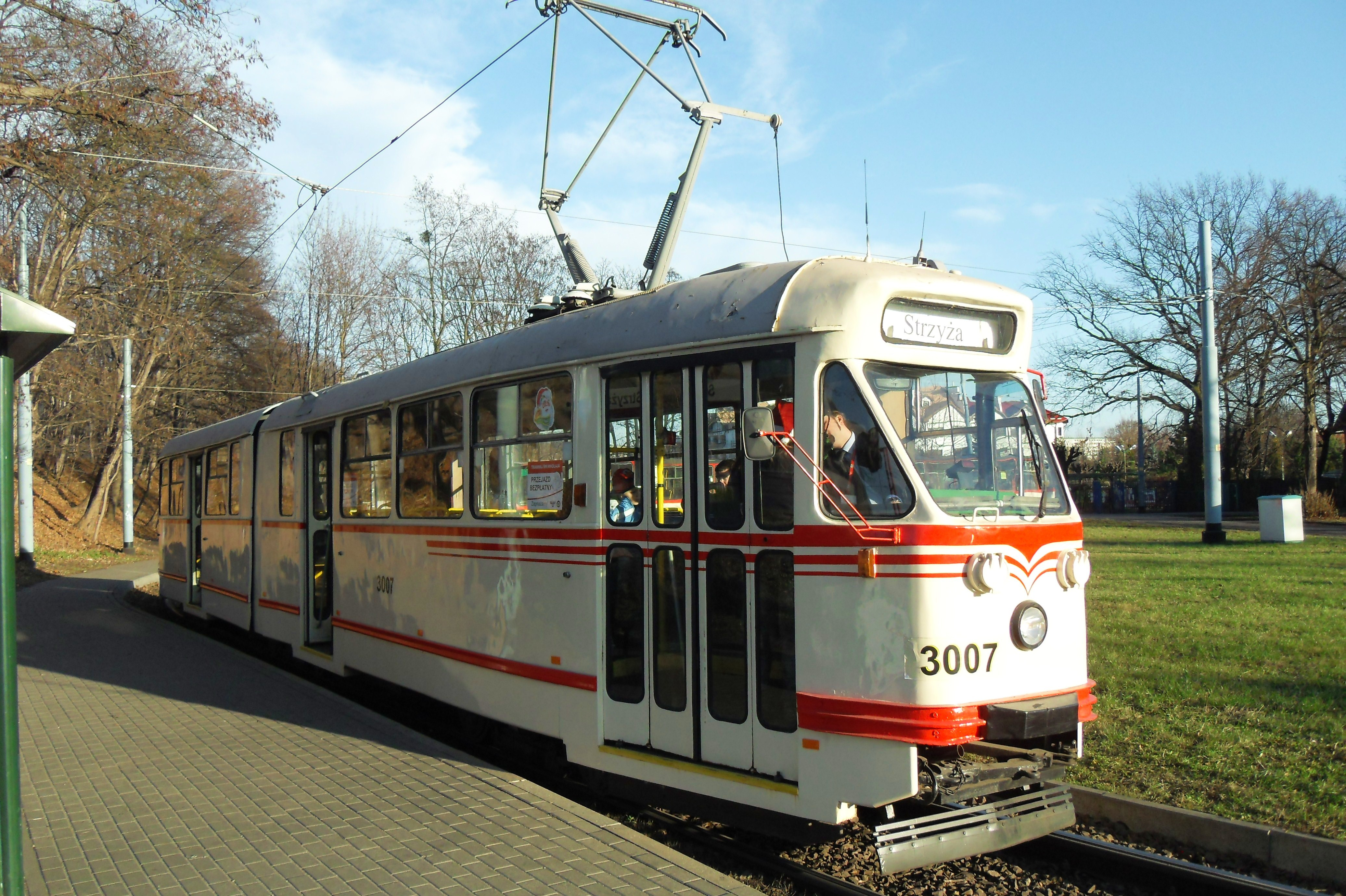 Gdańsk Strzyża. Konstal 102Na.